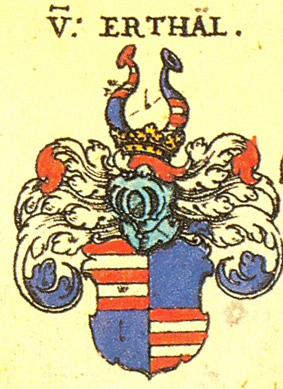 Ritterschaft und Adel in Franken von Erthal